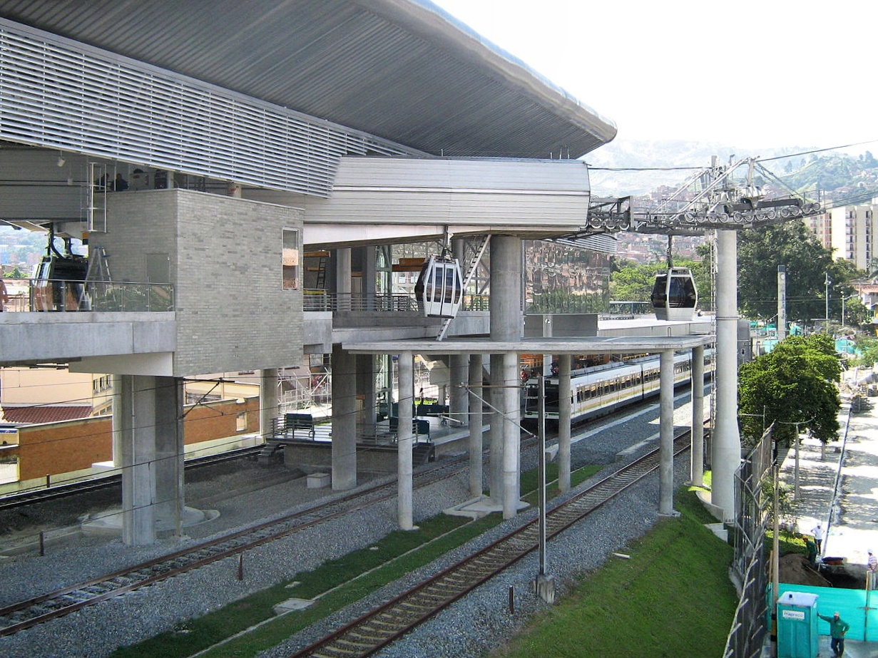 Estación San Javier del Metro de Medellín, Colombia.